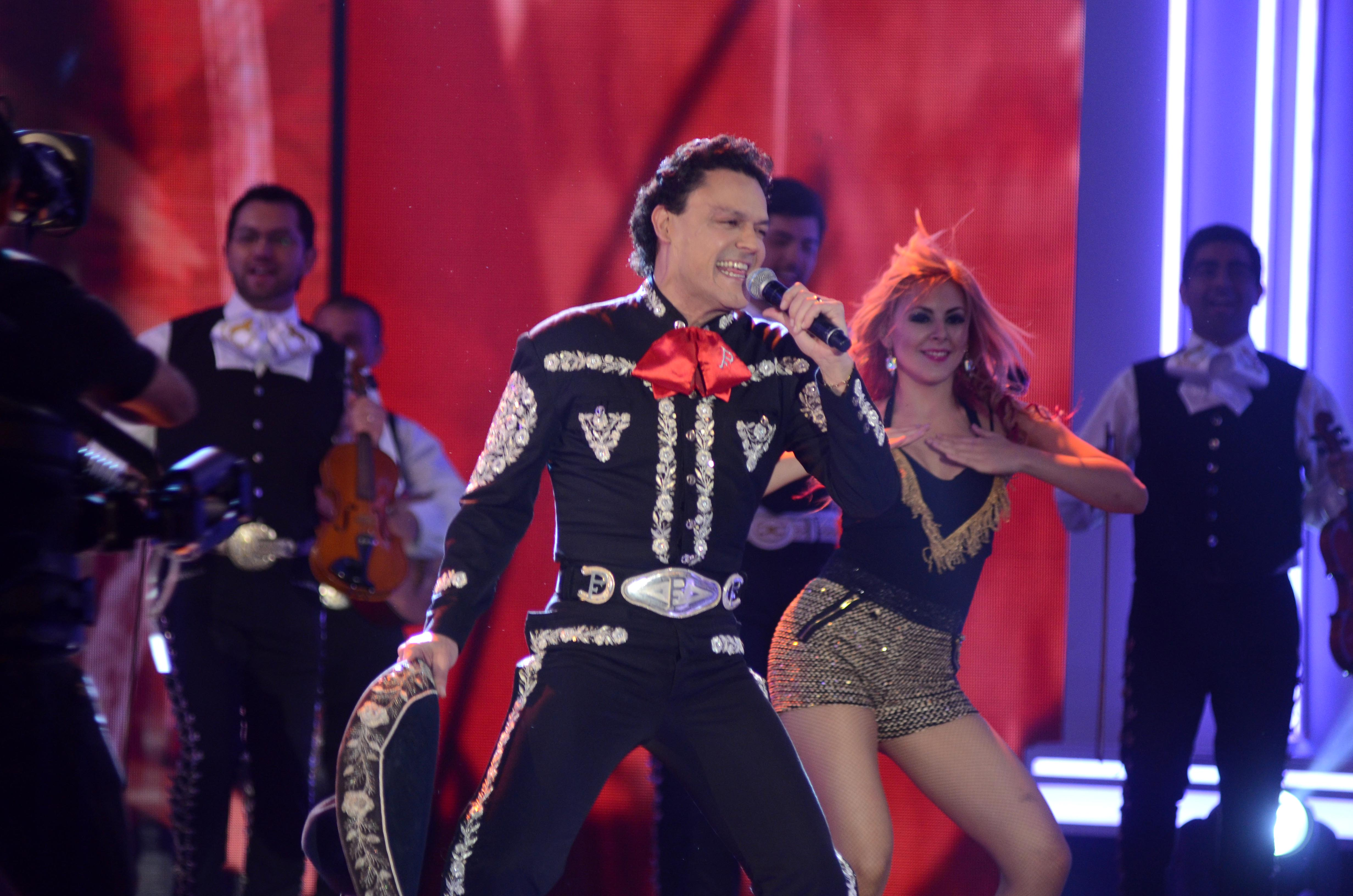 Ministro Elizalde asiste a la Ceremonia Inaugural de la Teletón